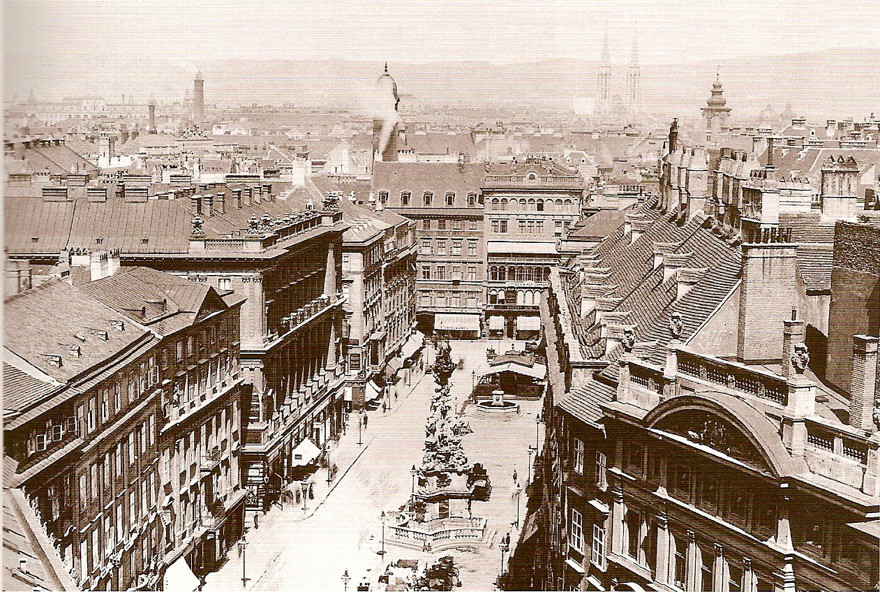 Wiener Graben um 1905 / The Graben-Street of Vienna about 1905